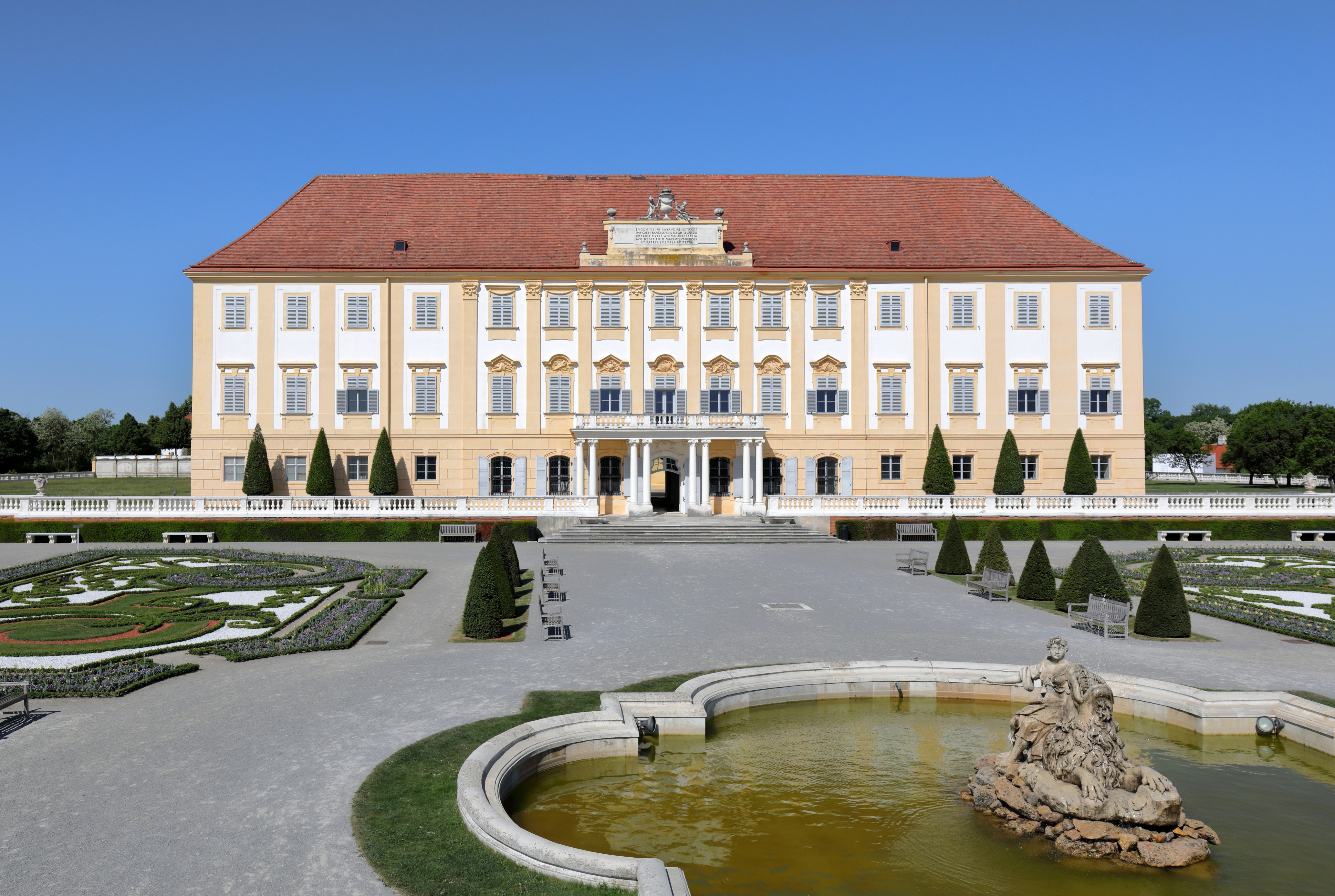 Die Hauptfassade bzw. der Osttrakt des Schlosses der Schlossanlage Schloss Hof in der niederösterreichischen Marktgemeinde Engelhartstetten.Die Schlossanlage wurde um 1627 auf einer Geländekante und östlich der mittelalterlichen Feste Hof errichtet. Nachdem 1725 Prinz Eugen die Anlage erworben hatte, baute er diese zu einem repräsentativen Landsitz aus. 1755 kam das Schloss in den Besitz von Maria Theresia. Von 1773 bis 1775 erfolgte dann ein Um- und Ausbau zum heutigen Erscheinungsbild durch Franz Anton Hillebrandt.